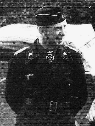 Il colonnello Rudolf Sieckenius; fronte orientale estate 1941